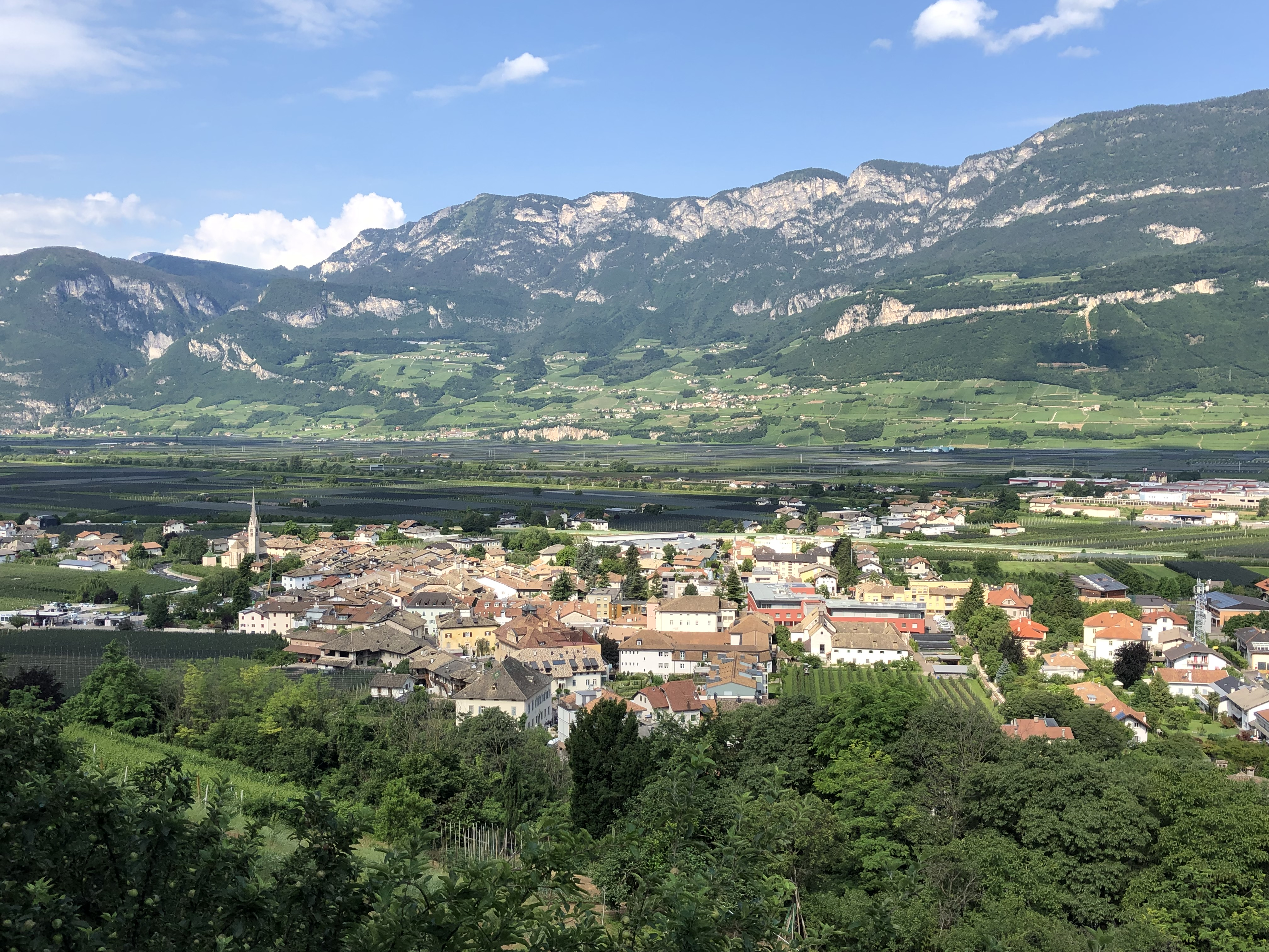 Neumarkt (Südtirol) von Osten